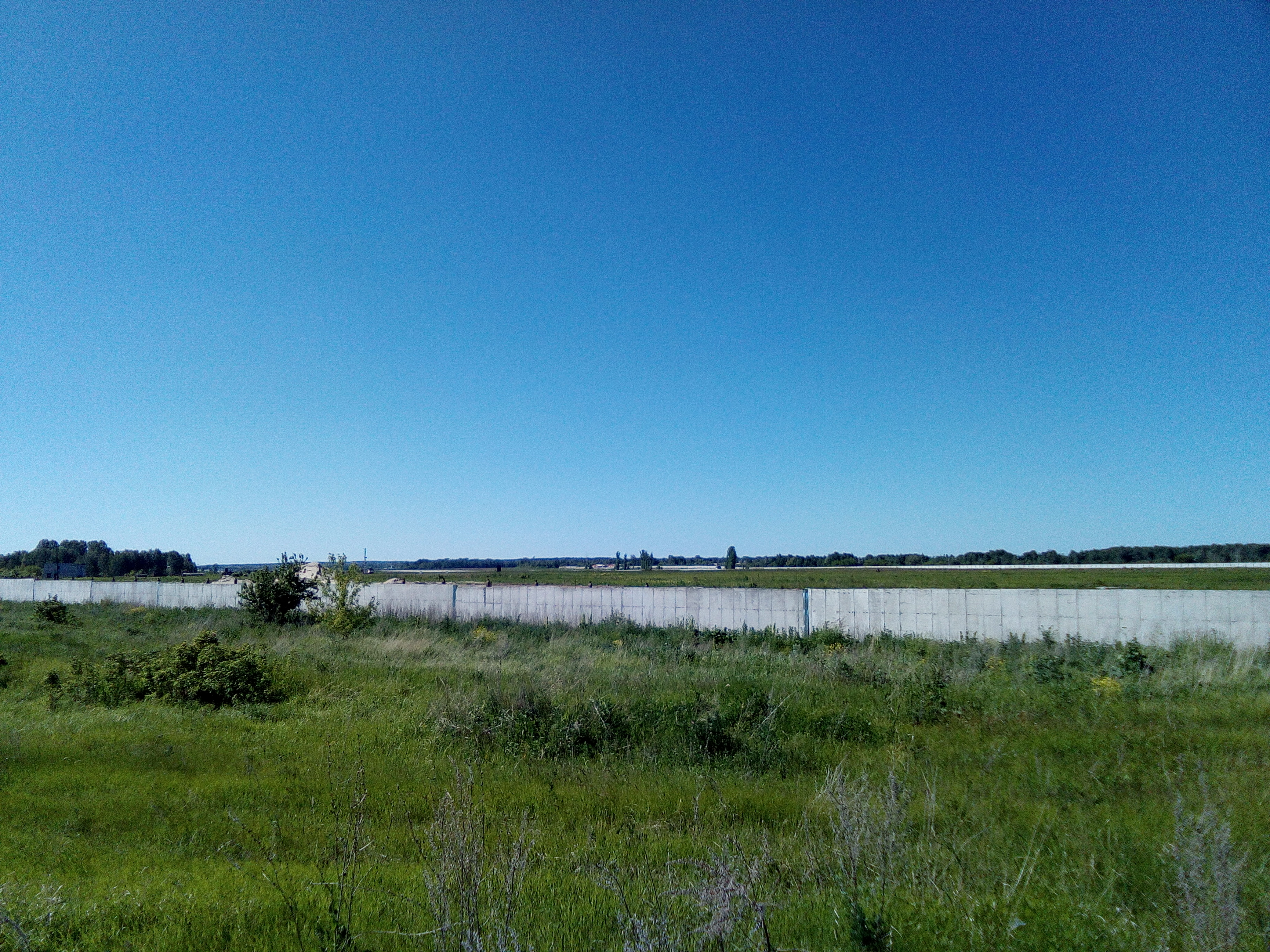 Аэродром Борисоглебское, Казань, створ ВВП